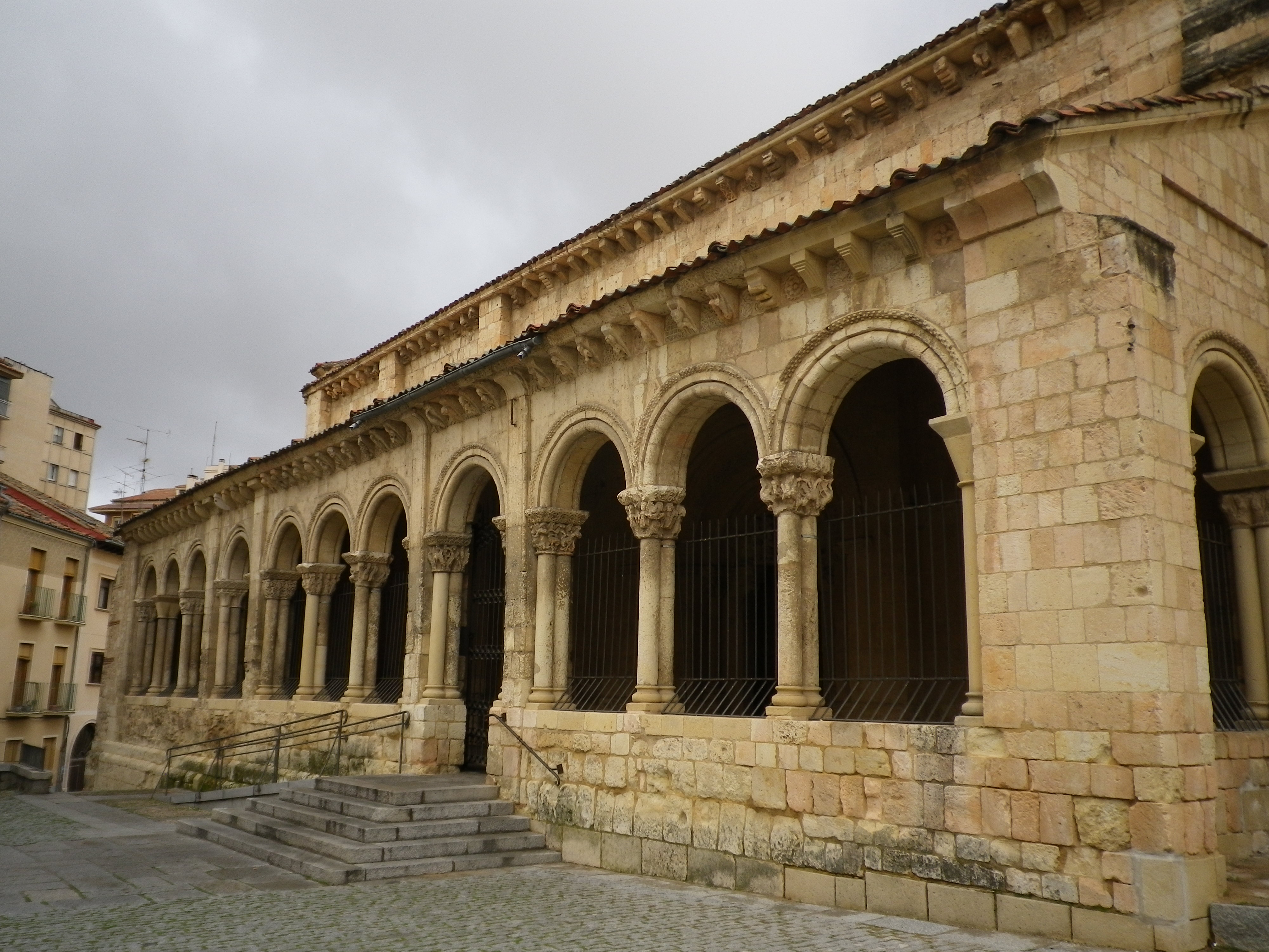 Segovia San Martin Church, southern wall view.